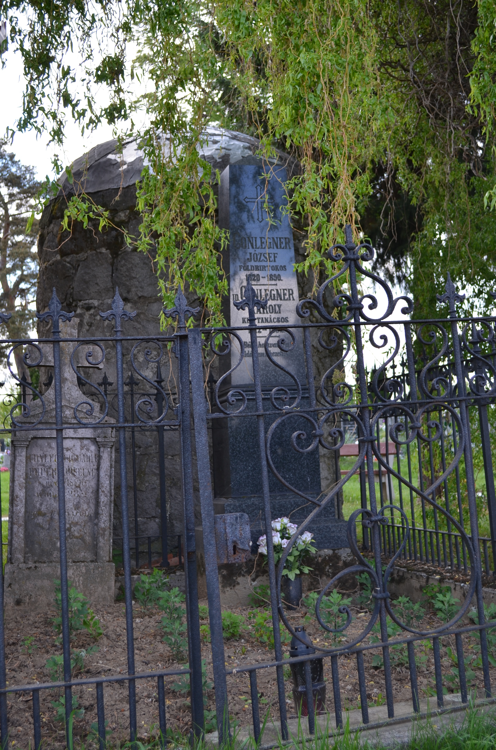 Néver